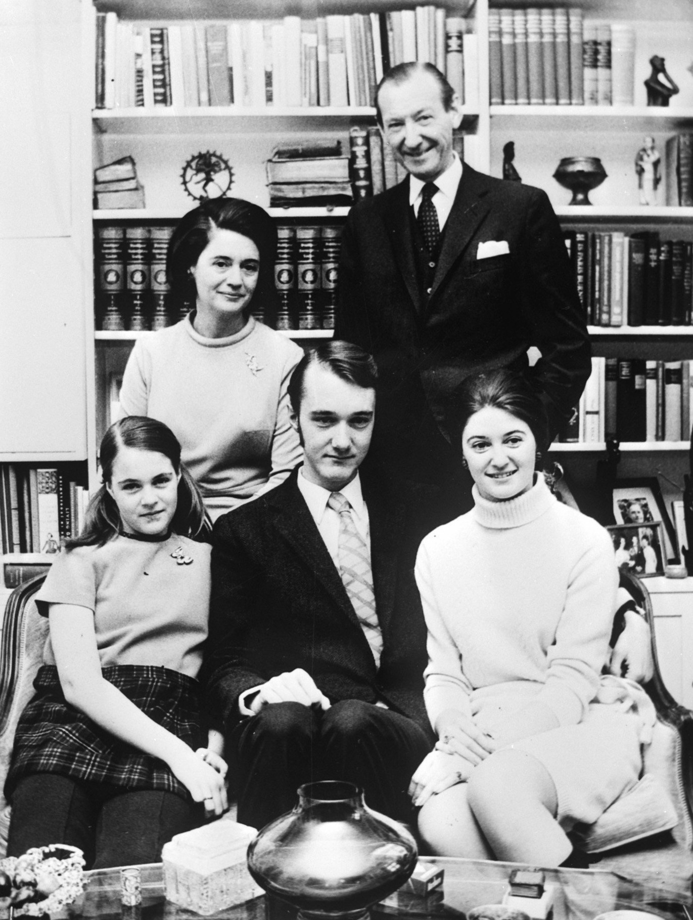 Dr. Kurt Waldheim (UNO ambassadeur Oostenrijk) voorgedragen als secretaris-generaal VN, Waldheim en echtgenote en drie kinderen